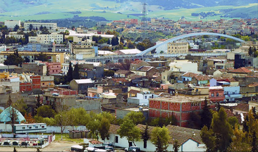 منظر لمدينة سواق اهراس